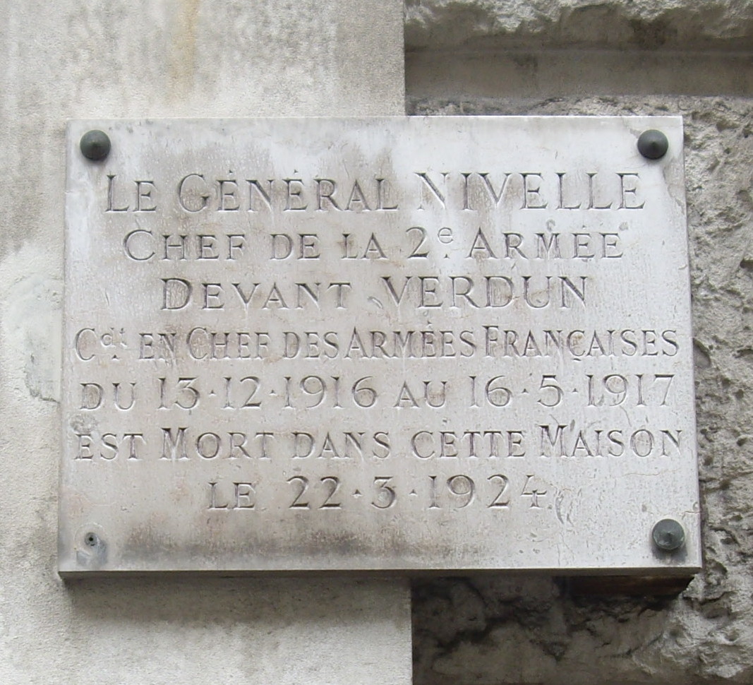 Plaque apposée au n° 33-35 de la rue de la Tour, Paris 16e.« Le général Nivelle, chef de la 2e Armée devant Verdun, cdt. en chef des Armées françaises du 13.12.1916 au 16.5.1917, est mort dans cette maison le 22.3.1924. »